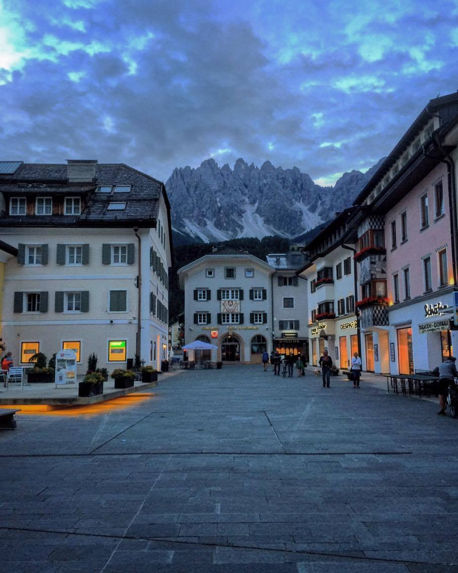 Vista san candido sera